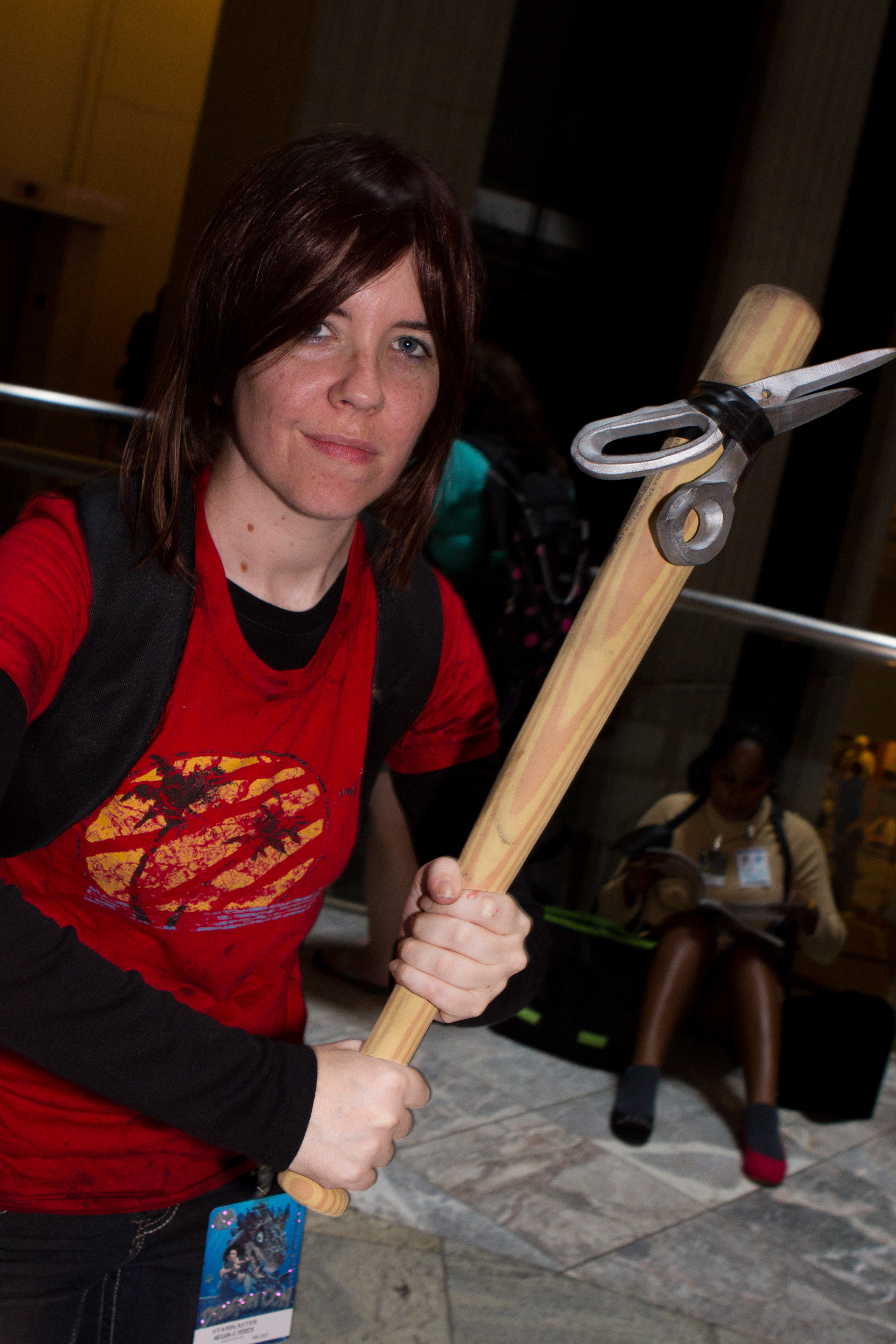 Cosplay at Dragon*Con 2013.